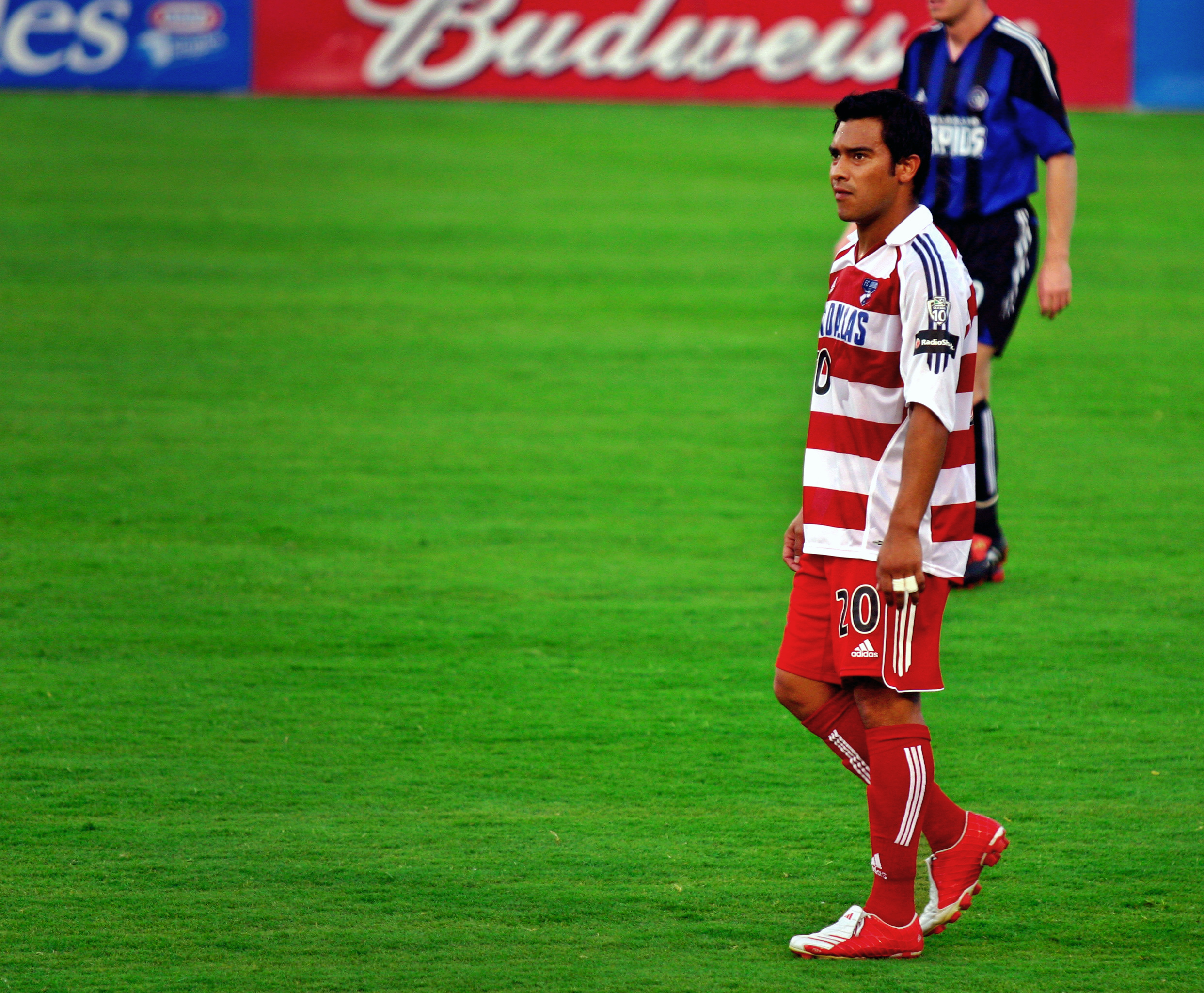 Carlos Ruiz, FC Dallas vs Colorado Rapids